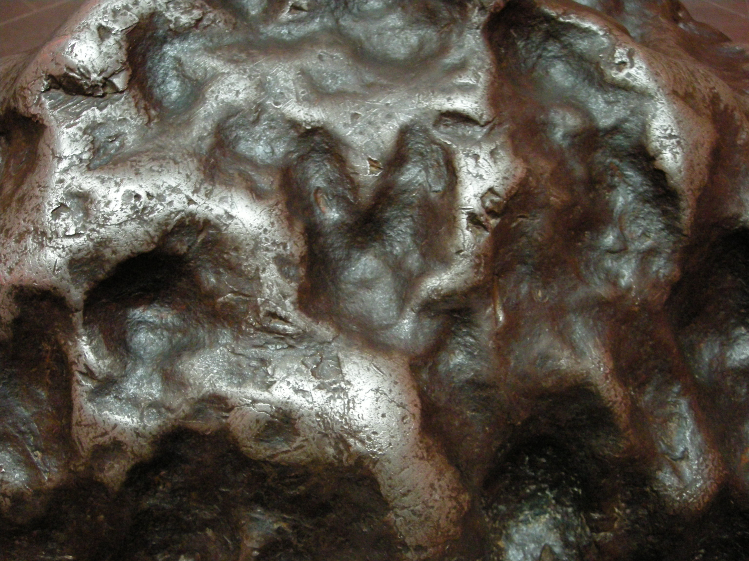 Détail d'une météorite d'un poids d'une demi-tonne, baptisée Tamentit, ayant été découverte dans les sables du Sahara en 1864. Actuellement exposée au Parc Vulcania (Puy-de-Dôme). Prêt du Museum national d'Histoire naturelle de Paris.